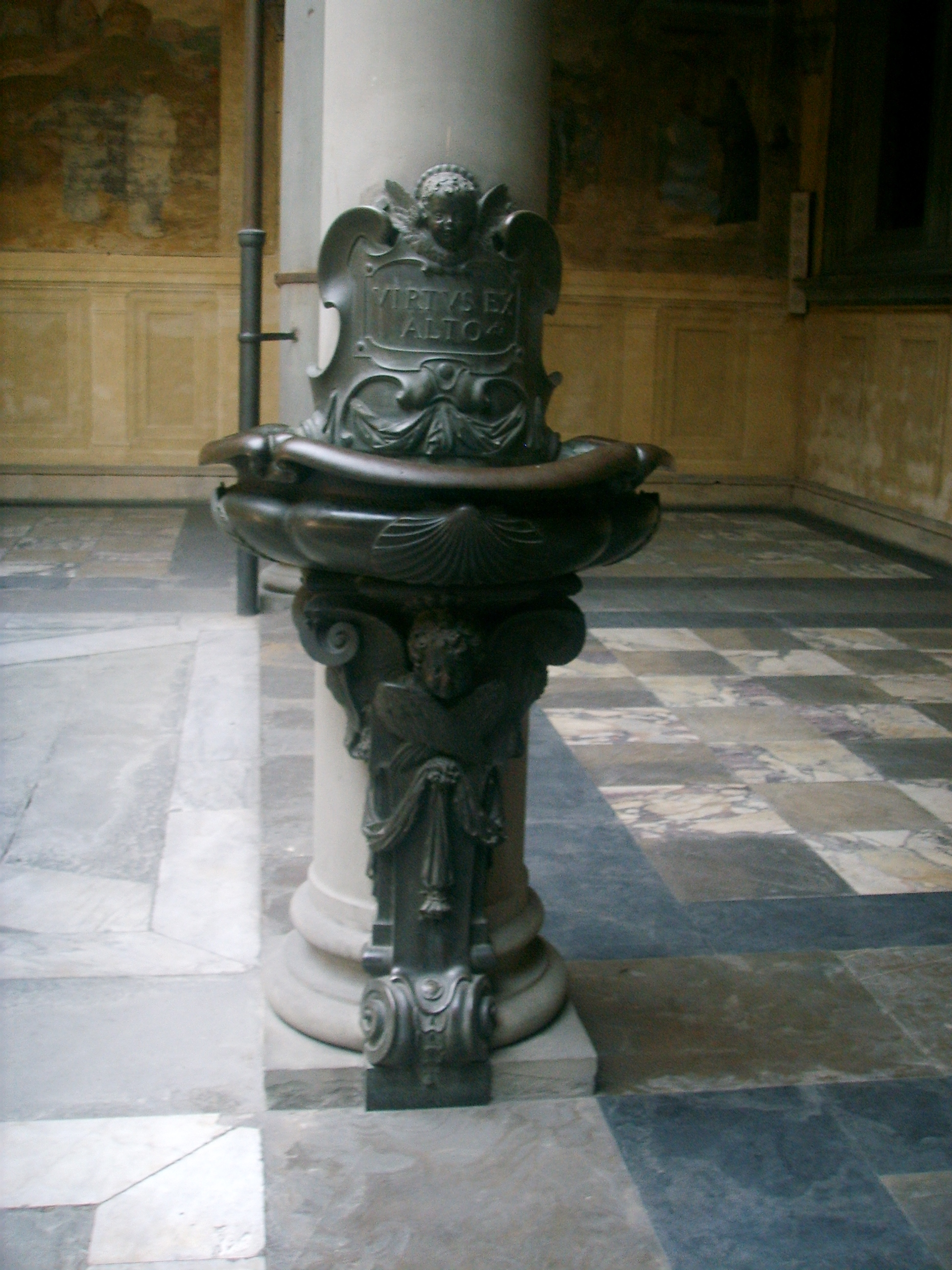 é